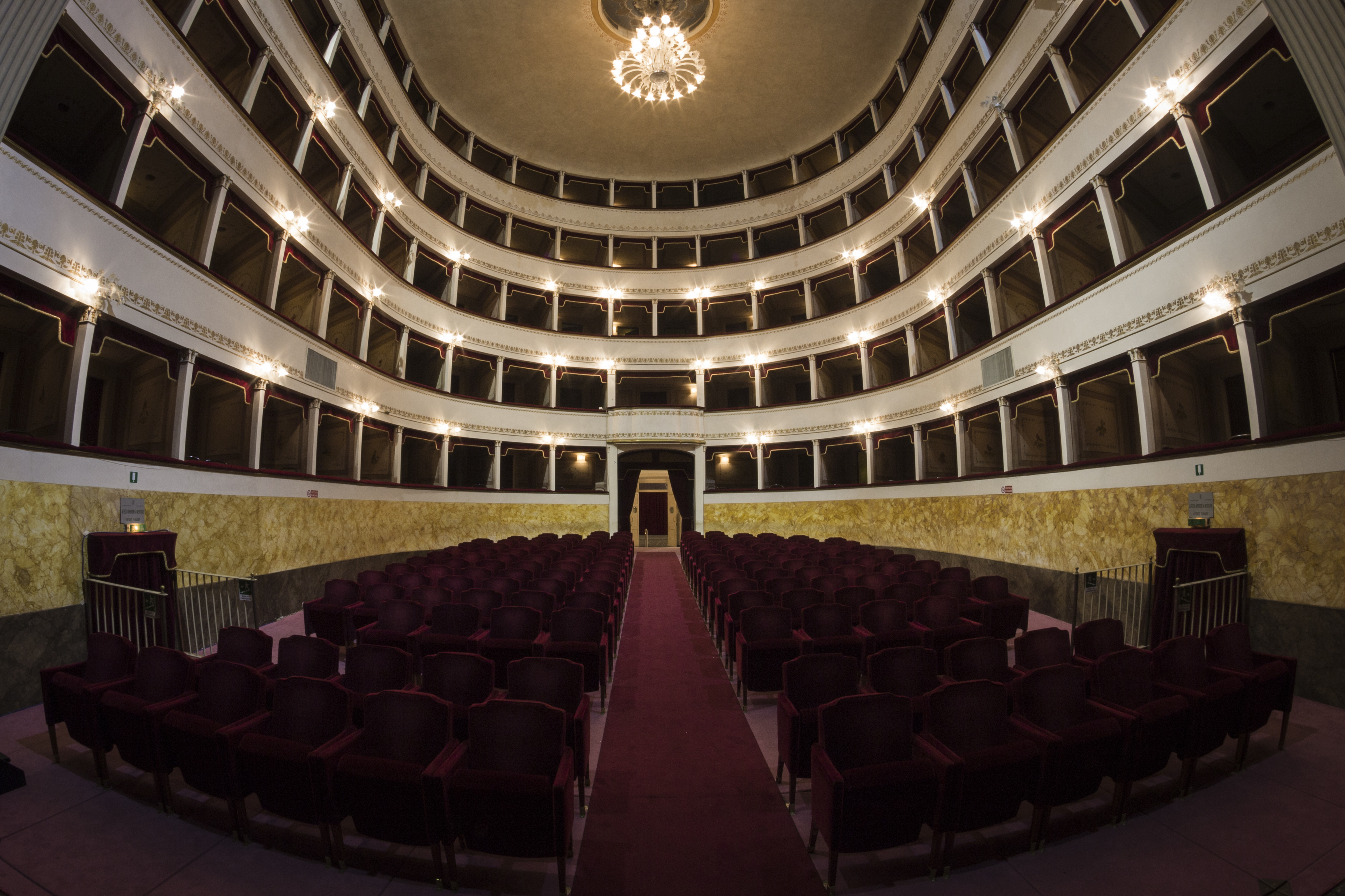 Teatro Pacini This is a photo of a monument which is part of cultural heritage of Italy.